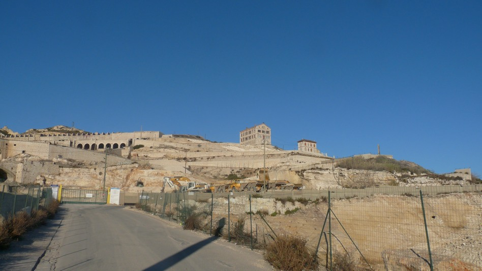 Mémoire des Riaux par S.E